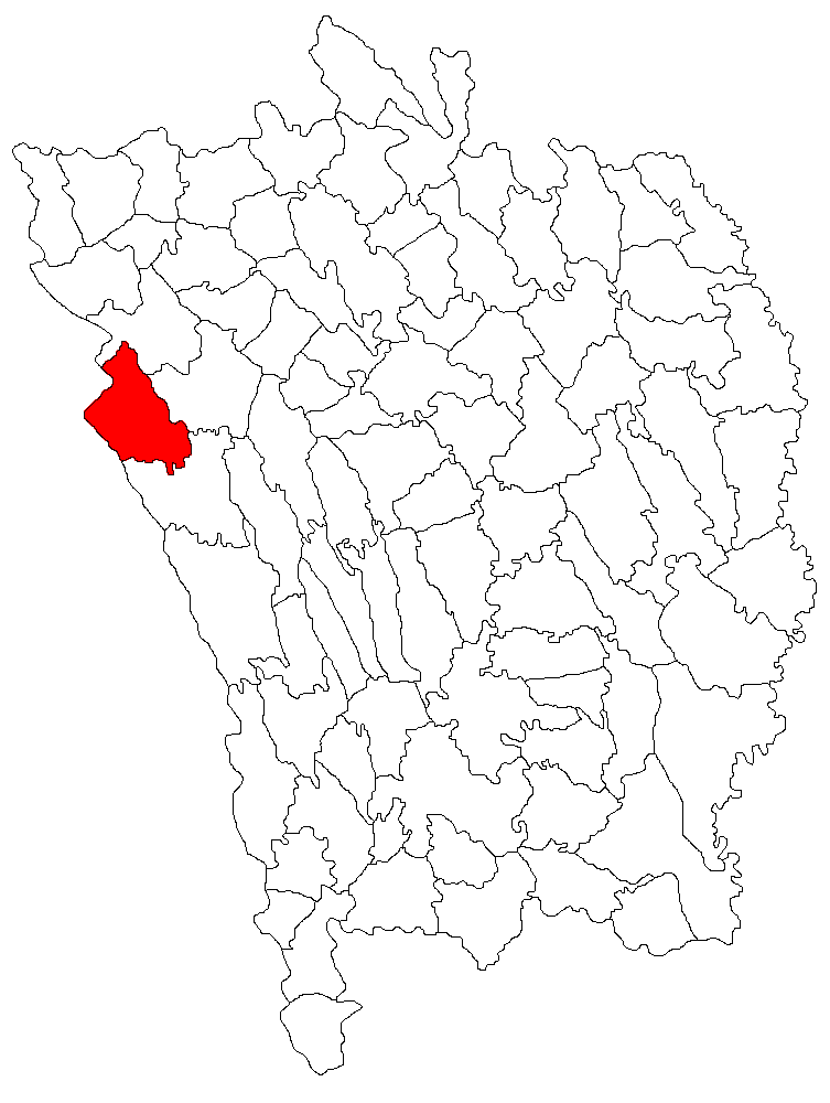 Categorie:Hărţi ale judeţului Vaslui